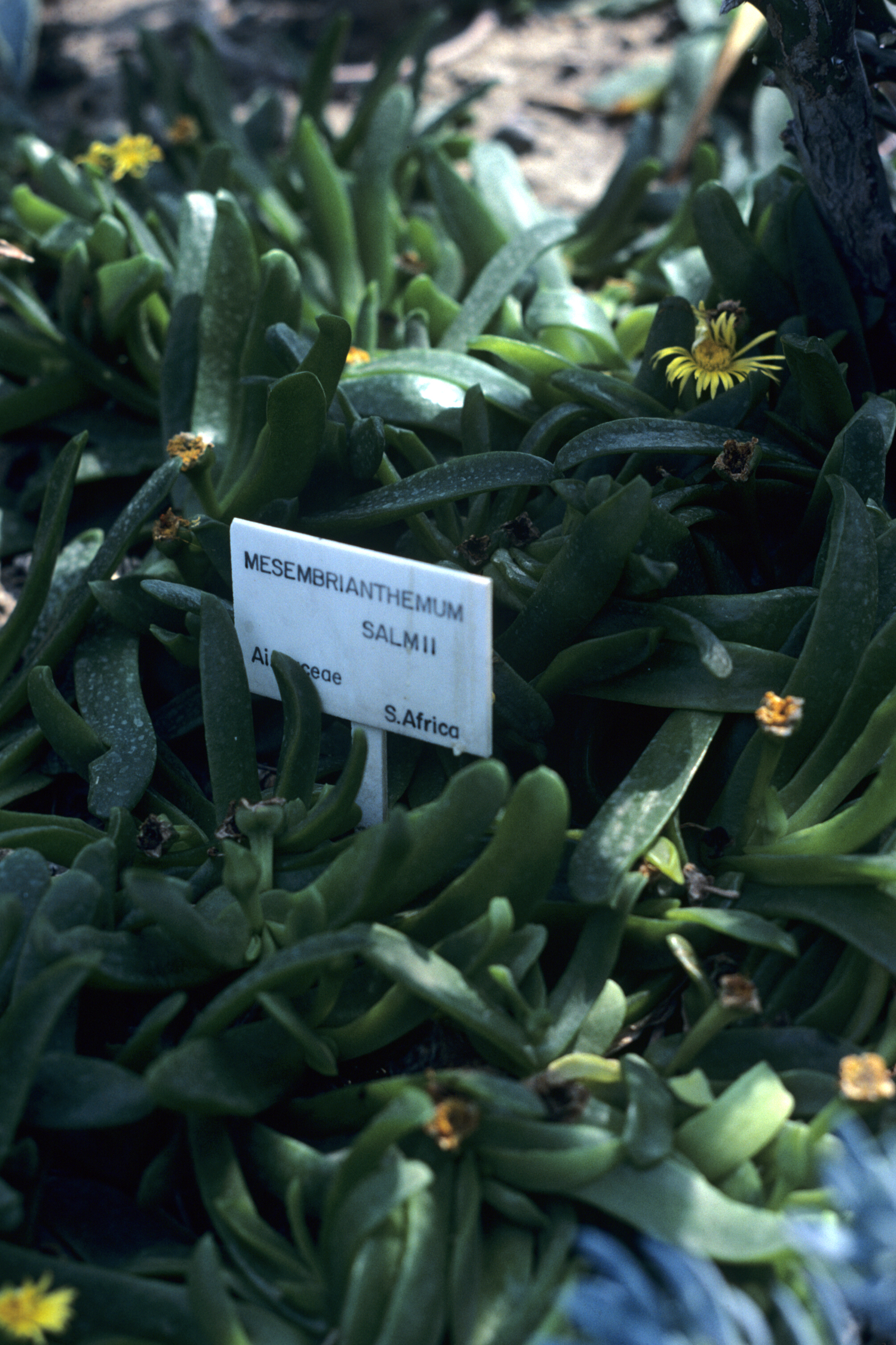 Glottiphyllum longum, mislabelled as Mesembrianthemum salmii